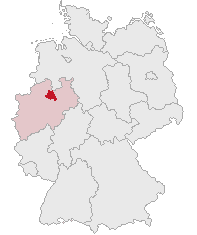 Kreis Warendorf, North Rhine-Westphalia, Germany